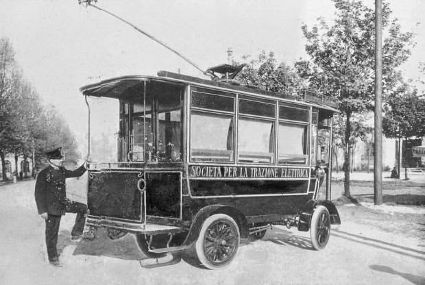 La Filovia elettrica sistema Cantono-Frigerio a Esposizioni Universali nel mondo e a Milano, 1906